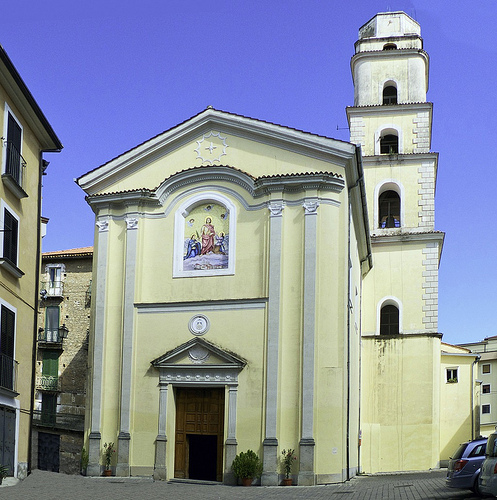 Facciata della Cattedrale di San Pantaleone in Vallo della Lucania (SA)